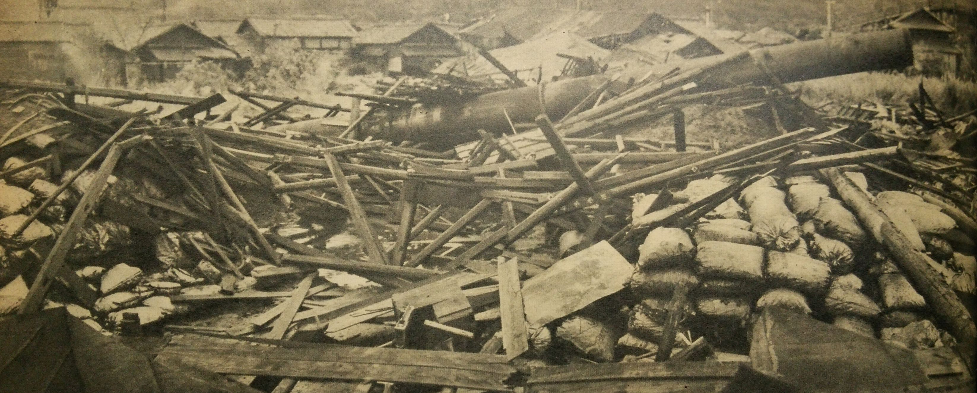 小倉市における台風第22号の被害